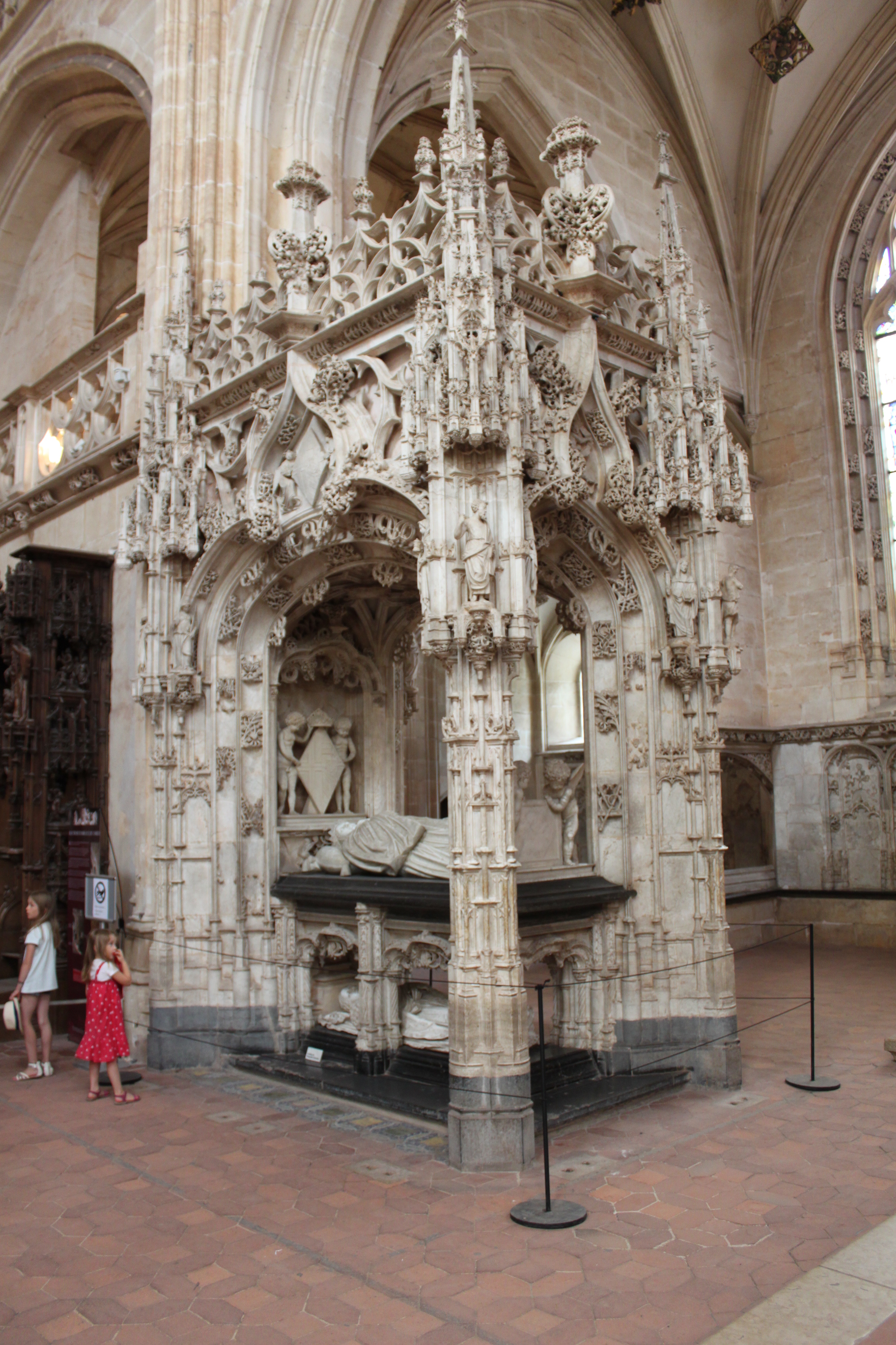 Monastère royal de Brou, Bourg en Bresse, France